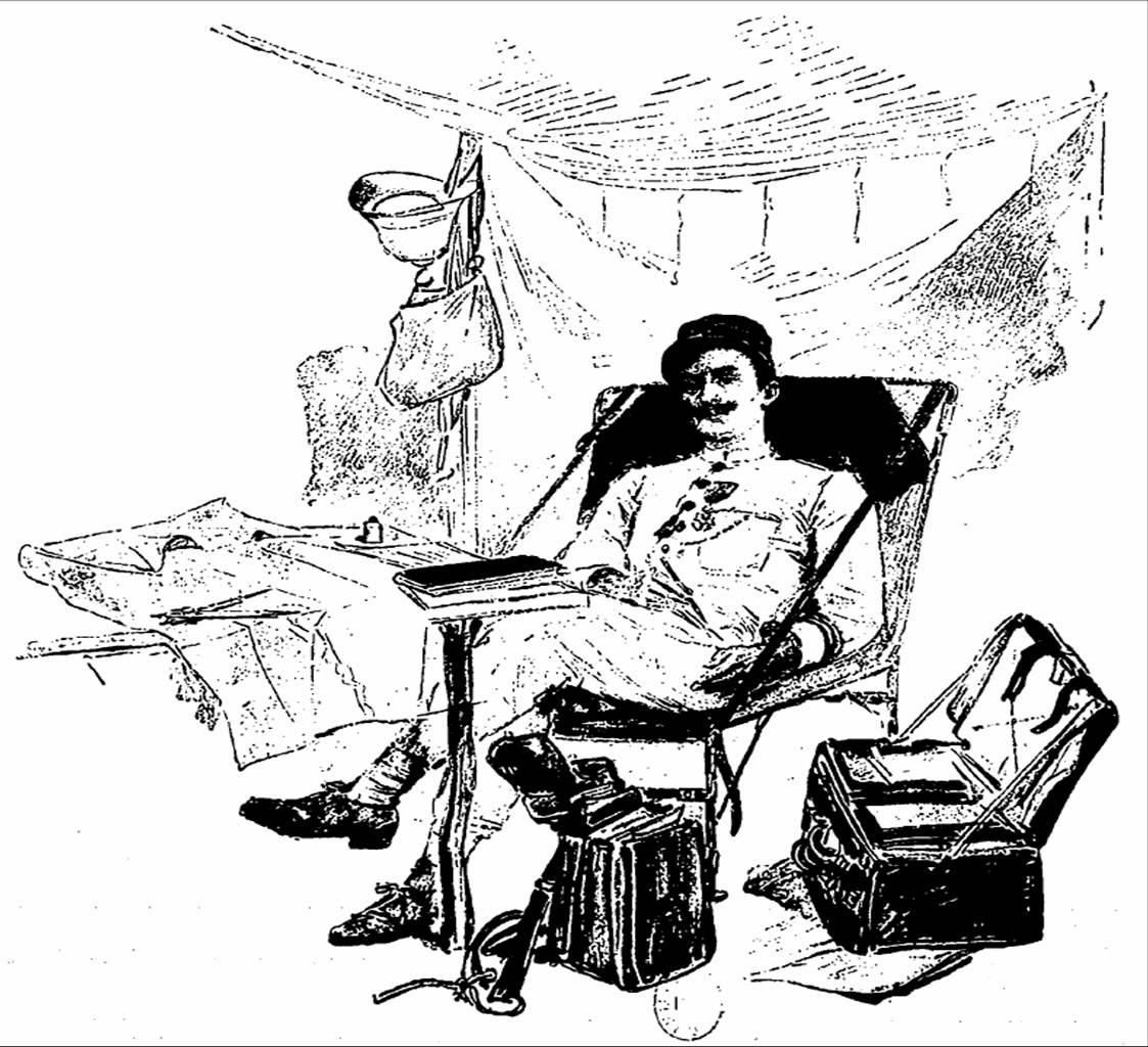 Le capitaine Henri François Brosselard-Faidherbe (1855-1893), officier et explorateur français, gravure publiée dans Casamance et Mellacorée, Paris, 1892